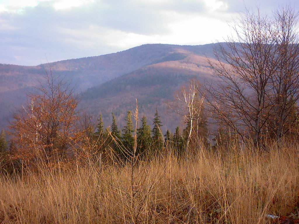 Ramię Szyndzielni opadające w kierunku zbiornika Wlk. Łąka widziane z Wysokiego